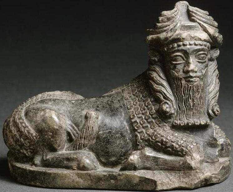 Sumerian God. Bull with man's head